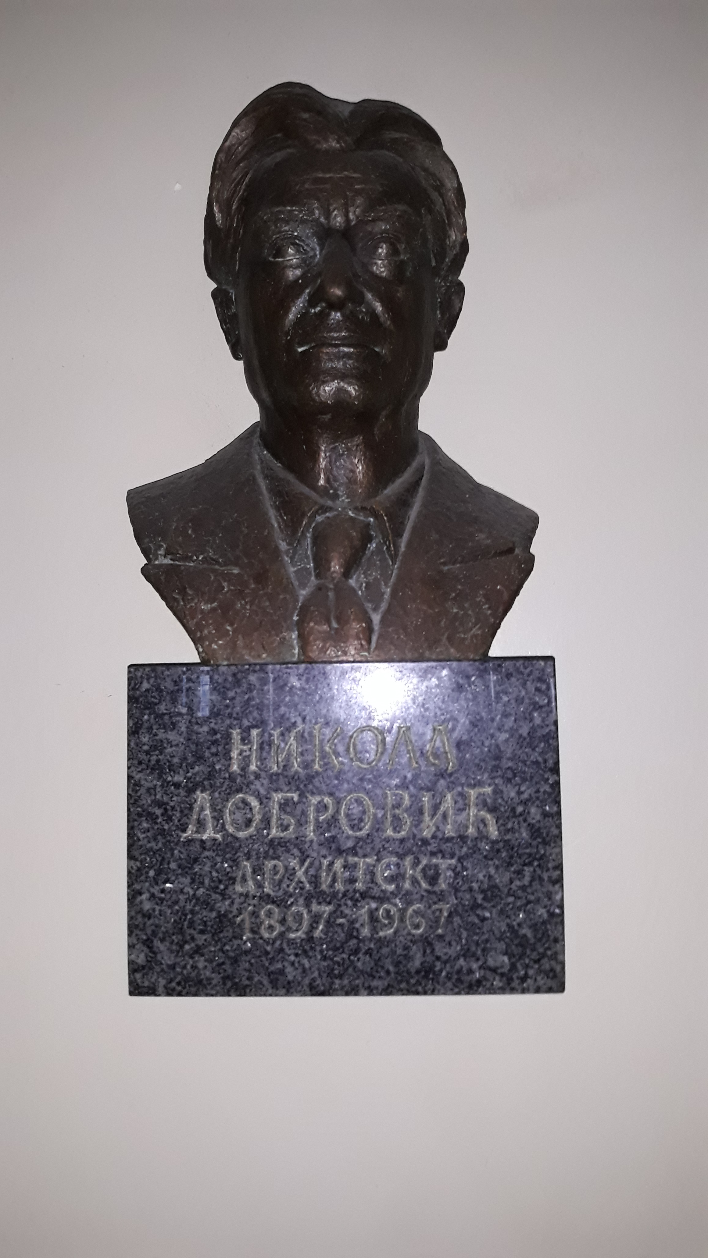 Биста Николи Добровићу постављена у Згради Техничких факултета у Београду